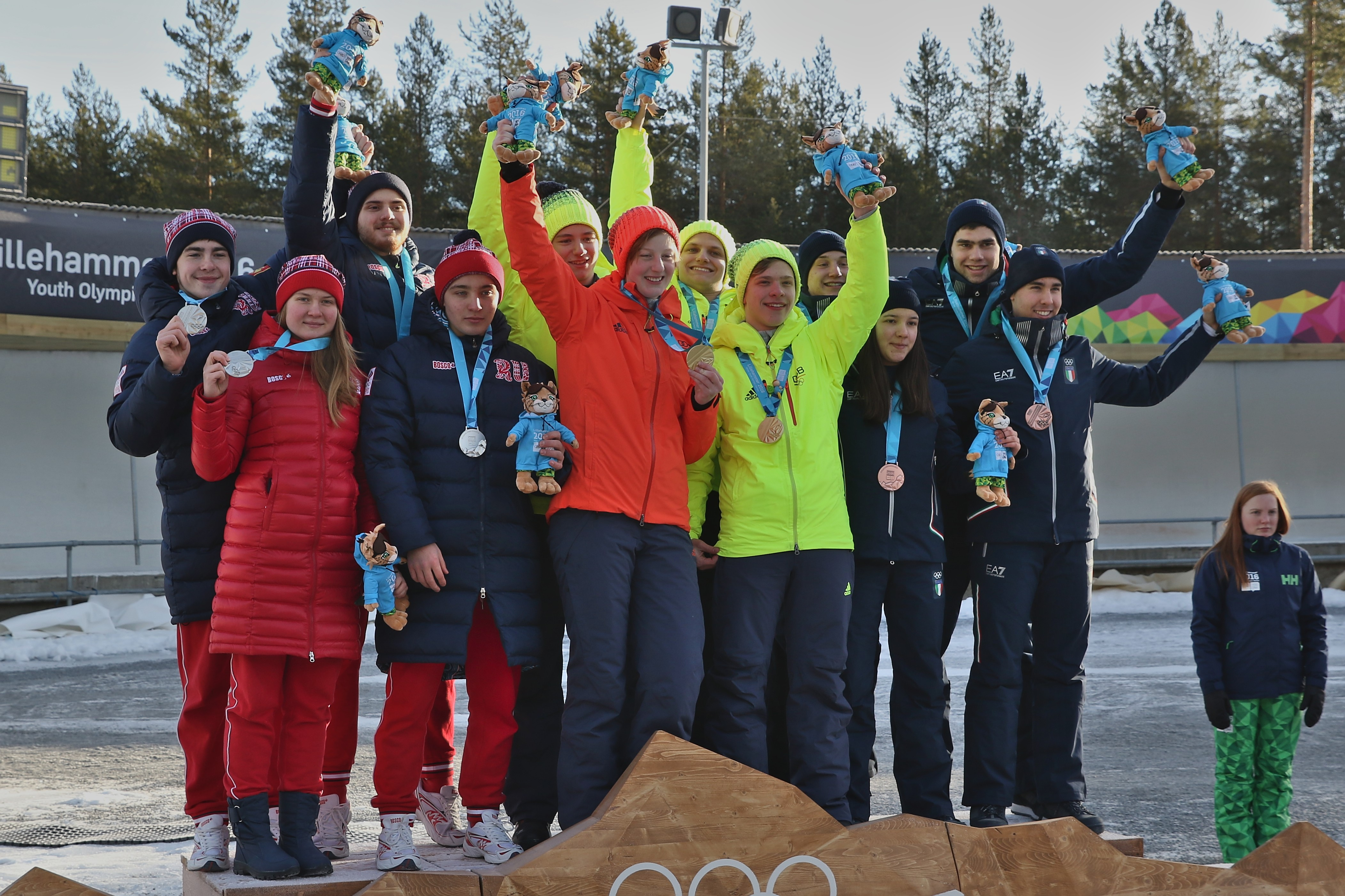 Lillehammer 2016 Luge team relay medalists